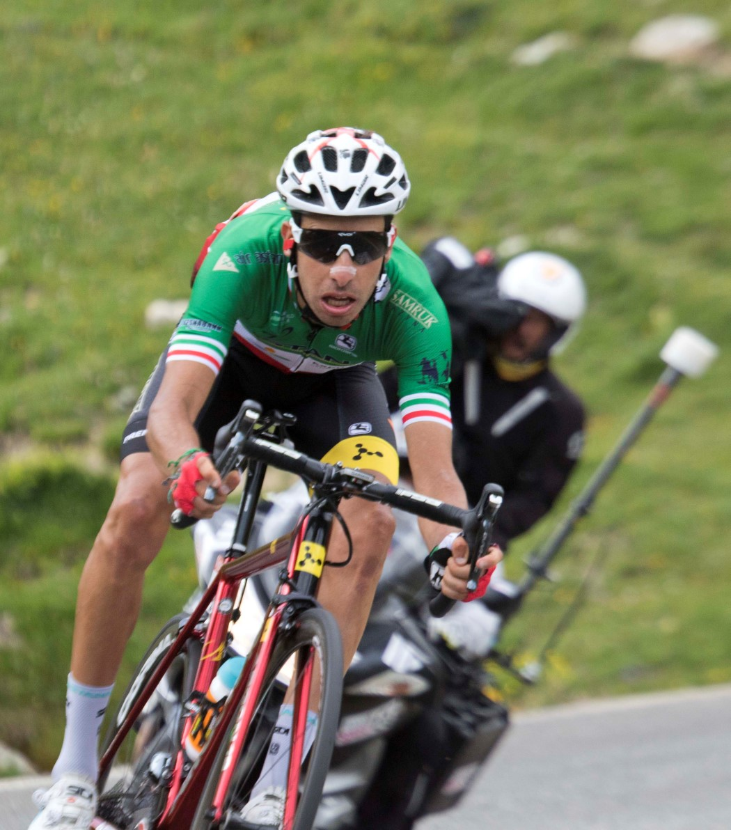 19-7_7 aru